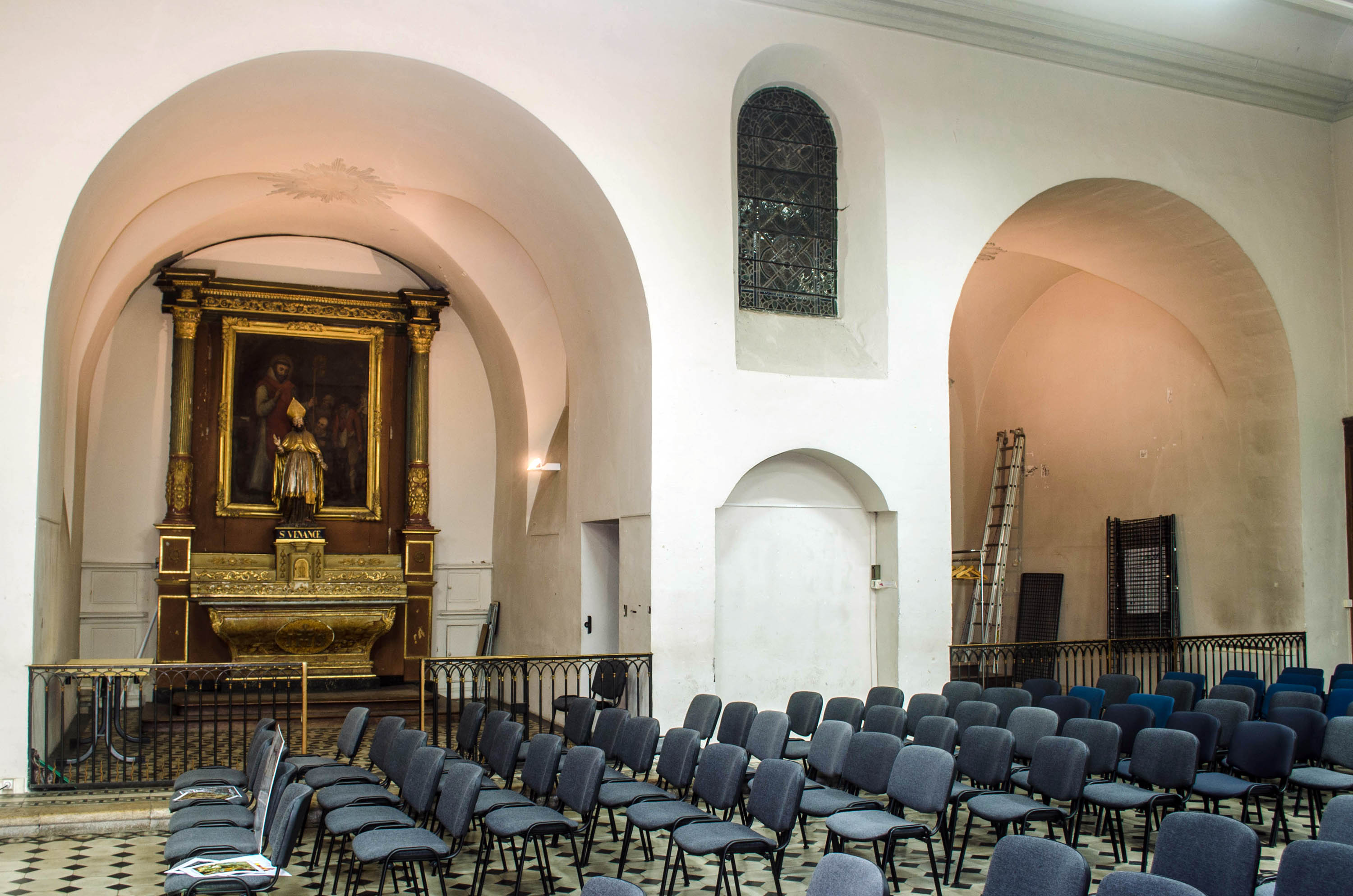 Valence (Drôme), chapelle des Capucins, chapelles latérales